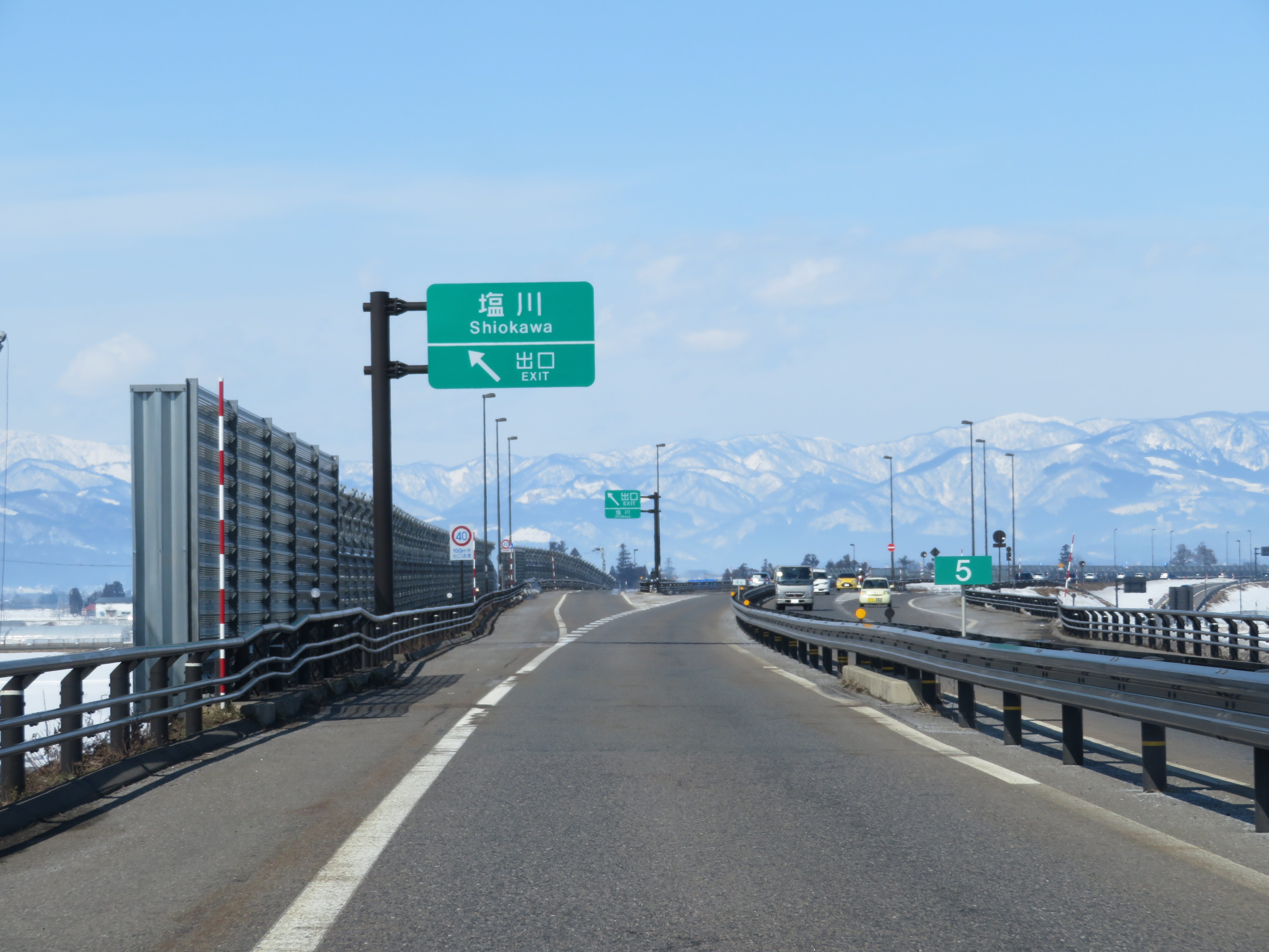 国道121号会津縦貫北道路 塩川インターチェンジ 出口付近（会津若松方面側から撮影）